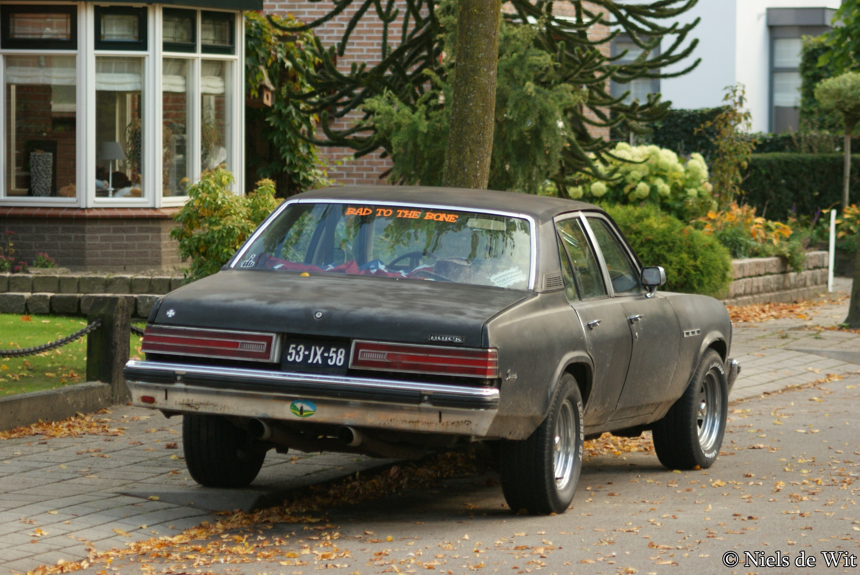 53-JX-58